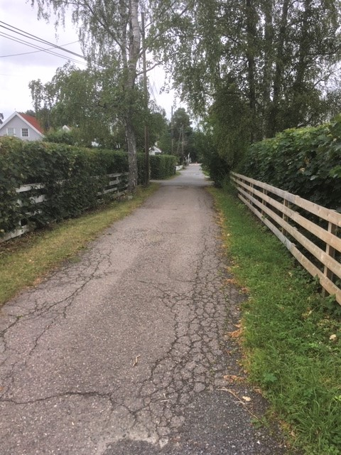 Kastellbakken i Oslo august 2019